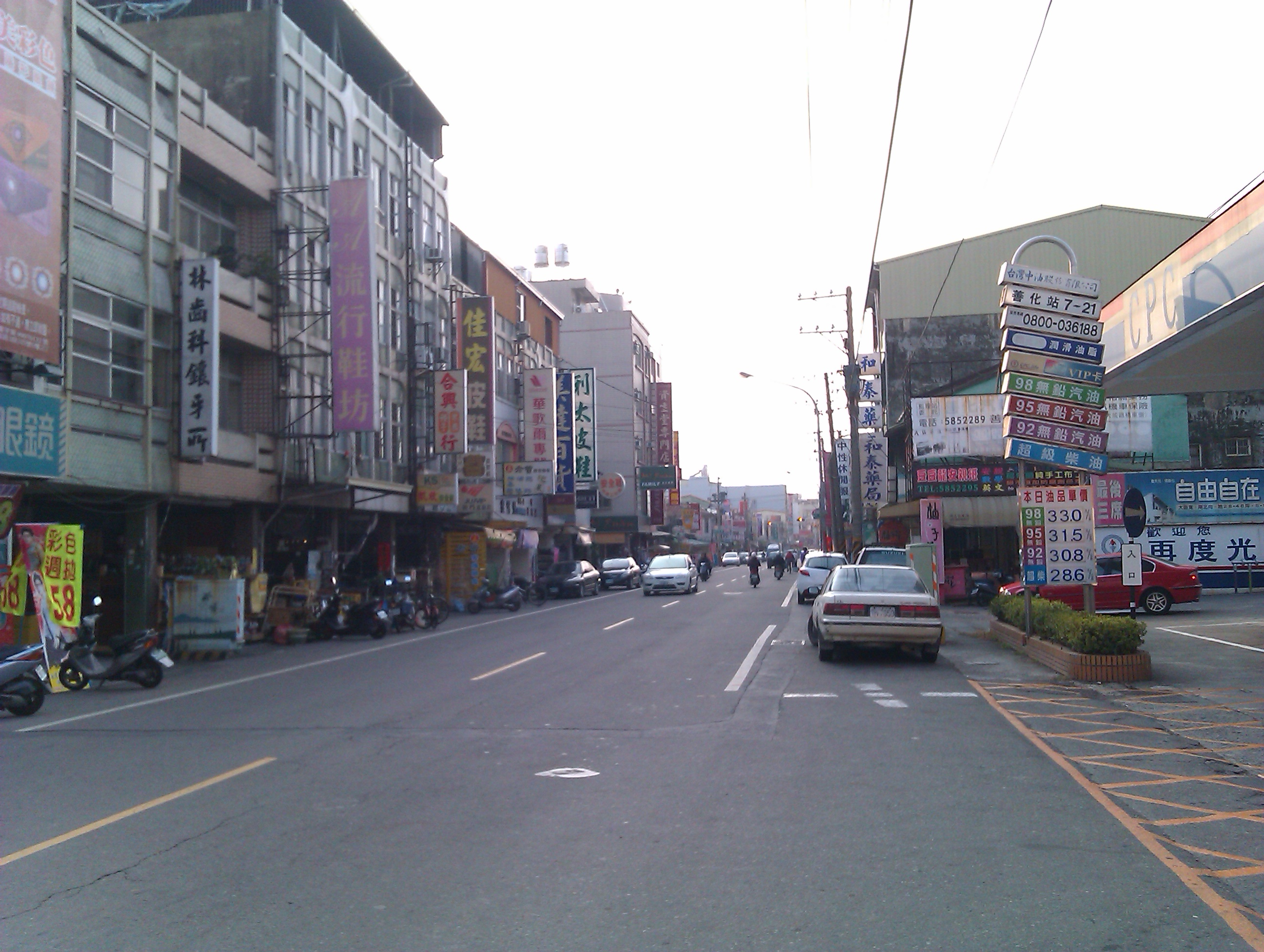 臺南市善化區中山路，臺灣中油善化站前。